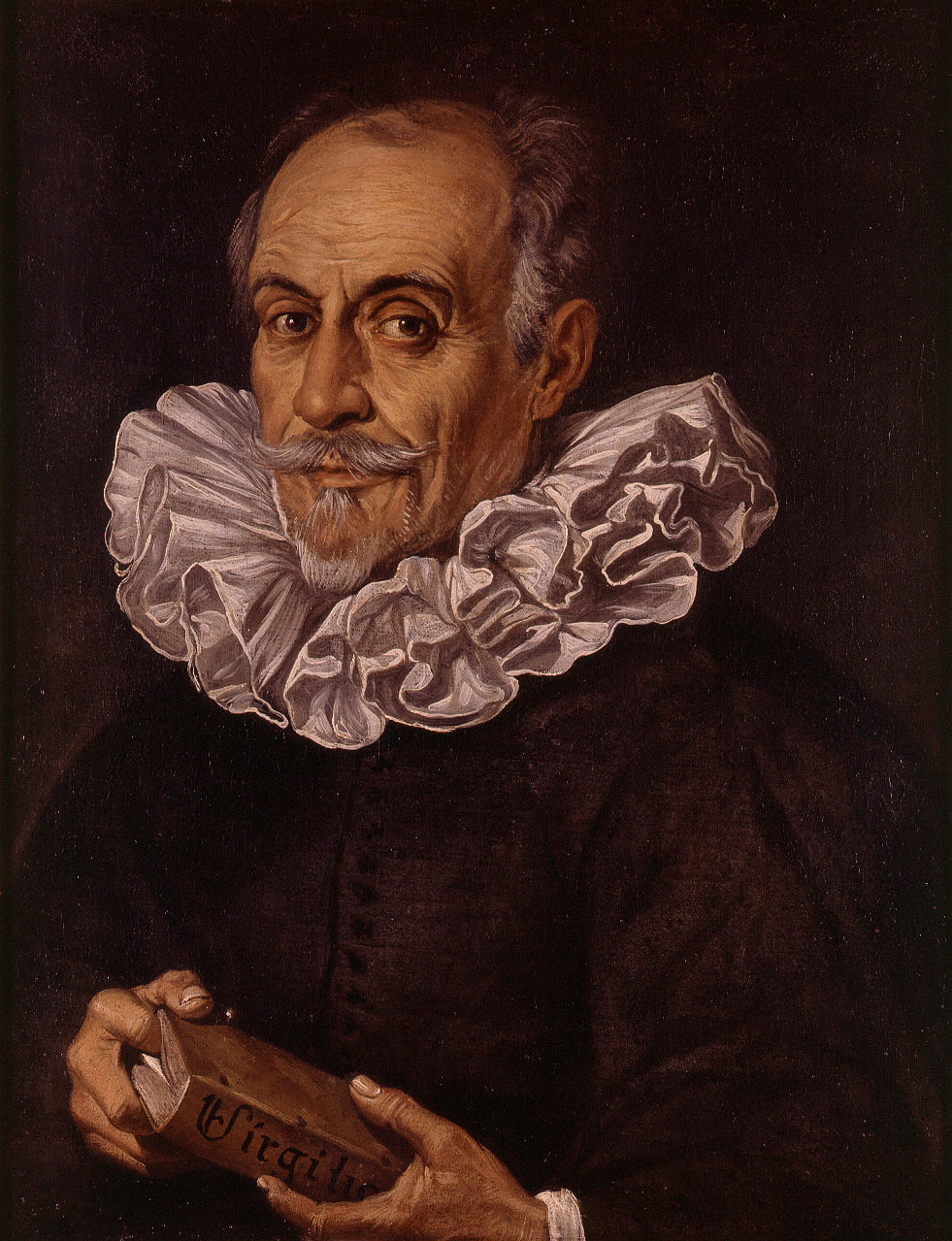 Retrato del poeta y dramaturgo español Gaspar Aguilar (1561-1623).